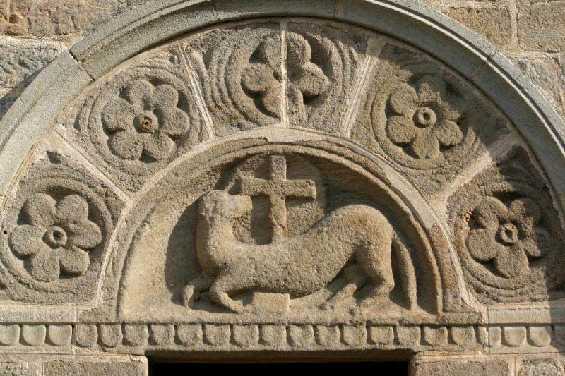 Tympan du portail latéral sud de l'église de Varenne l'Arconce